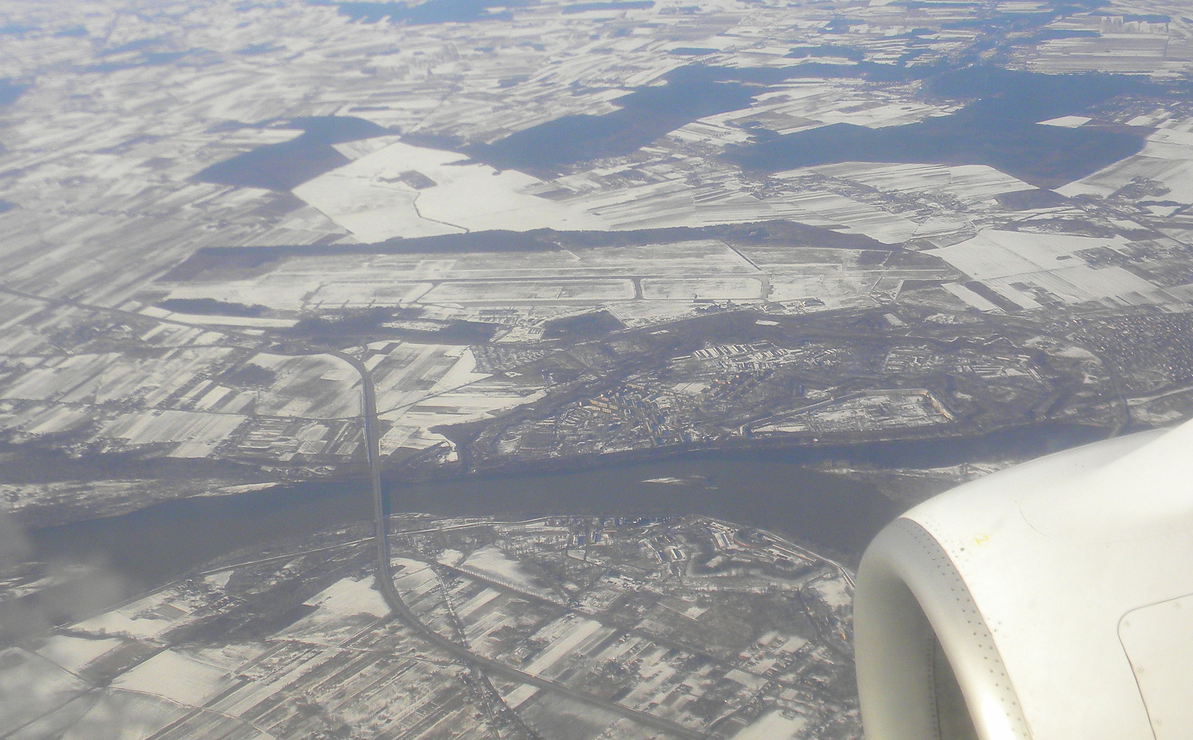 WIdok na lotnisko w Modlinie i okolice